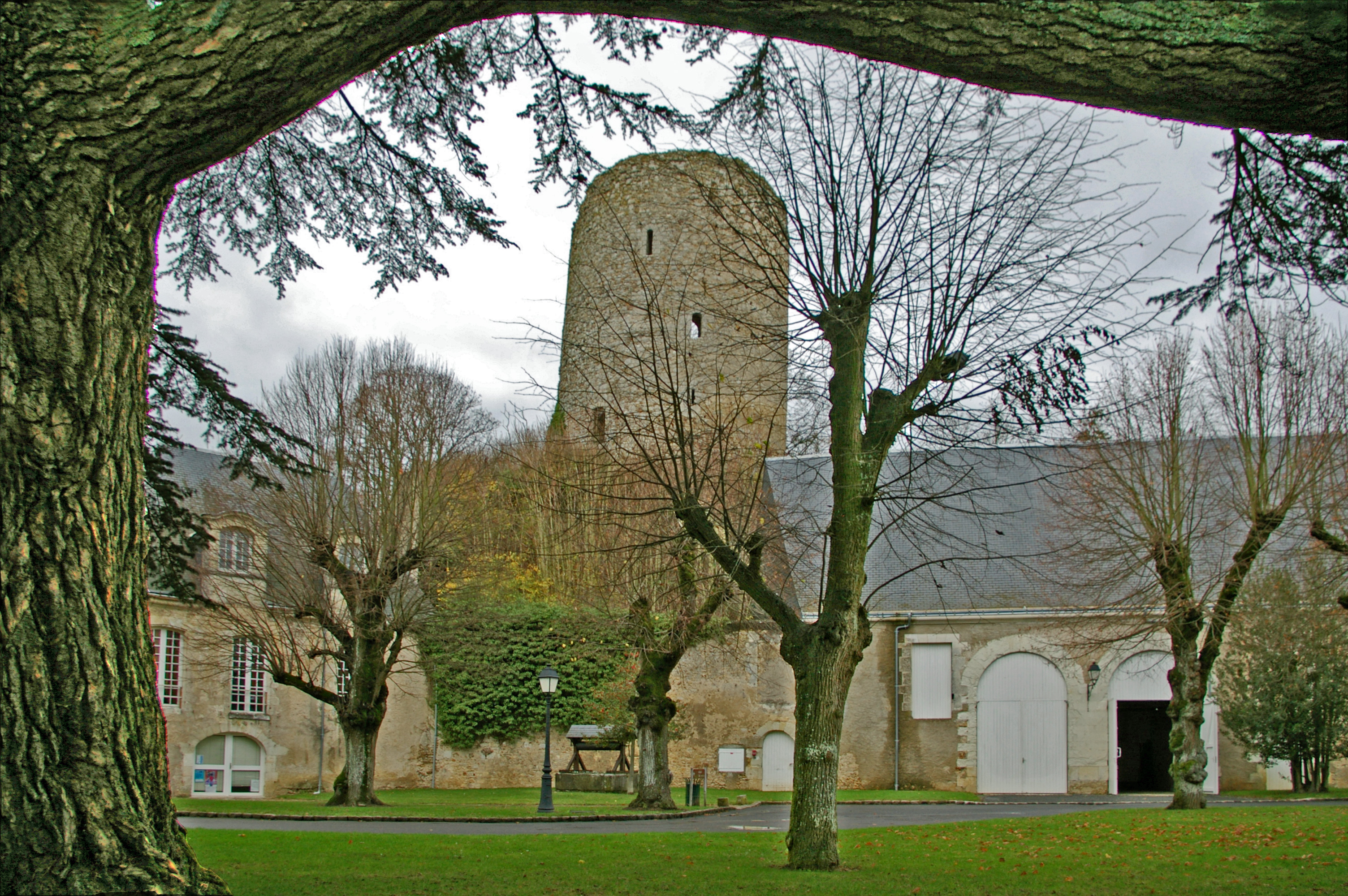 Le château des comtes de Blois à Château-Renault, Indre-et-Loire